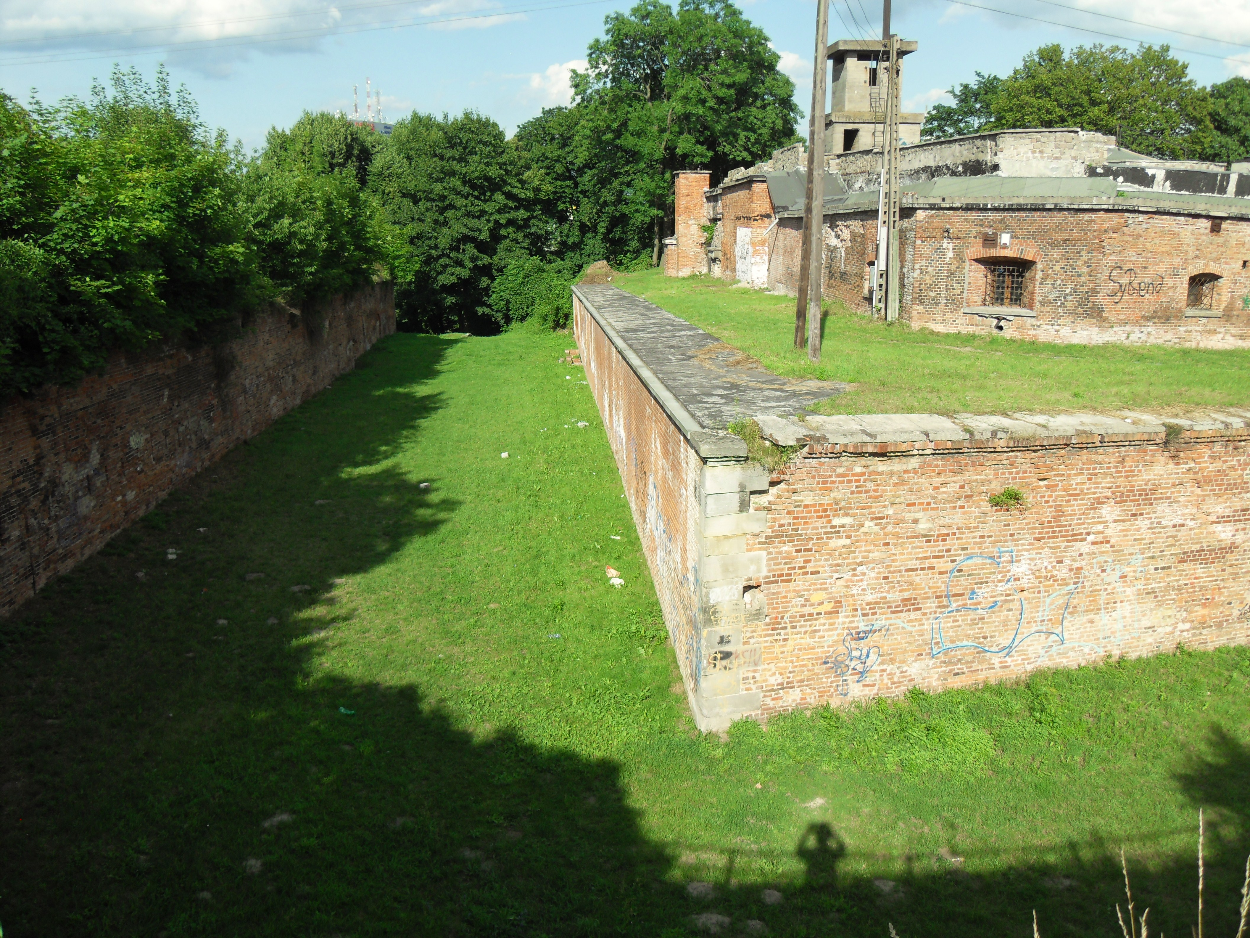 Gdańsk, Reduta Napoleońska w Grodzisku.